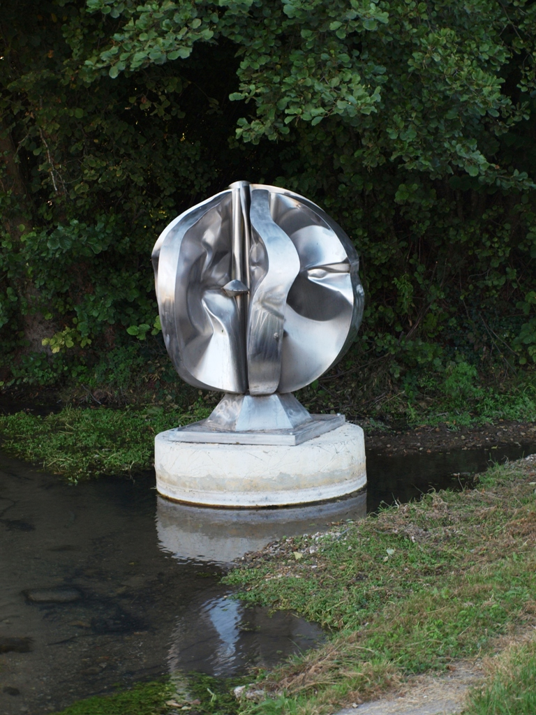 Saint-Aubin-Château-Neuf (Yonne, France) ; statue moderne, Bouquet d'espoir, Alain Vuillemet, inox (page de présentation). Elle était située en bas de la rue de Lampy, près du moulin du berceau ; elle a été déménagée avant juin 2017.